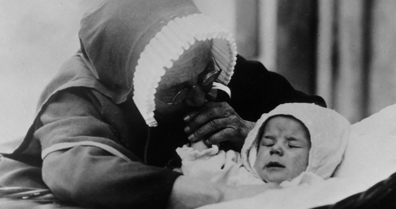 La vénérable Suzanne Aubert avec un enfant abandonné.